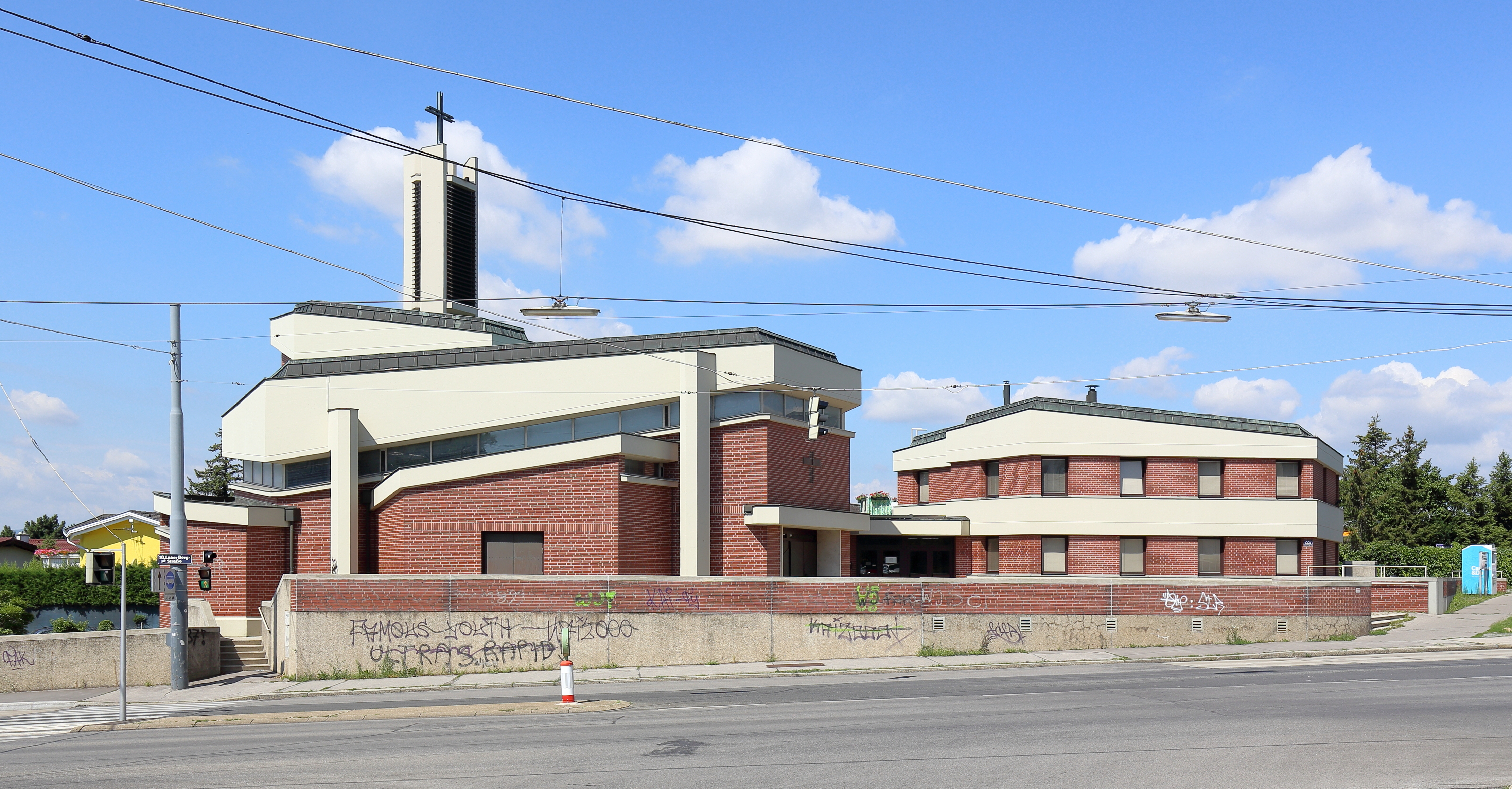 Kirche Zum Heiligen Kreuz und Pfarrzentrum am Laaer Berg an der Adresse Laaer-Berg-Straße 222 im 10. Wiener Gemeindebezirk Favoriten. Die Kirche mit einem ungleichschenkeligen sechseckigen Grundriss und freistehendem Kirchturm sowie das nördlich anschließende Pfarrhaus wurde nach Plänen des Architekten Herbert Schmid gegenüber dem Kurpark Oberlaa auf einer Anhöhe errichtet und 1986 geweiht.Das moderne Gesamtkunstwerk wurde in Anspielung auf die früher dominante Ziegelerzeugung in dieser Gegend in Sichtziegelbauweise ausgeführt.